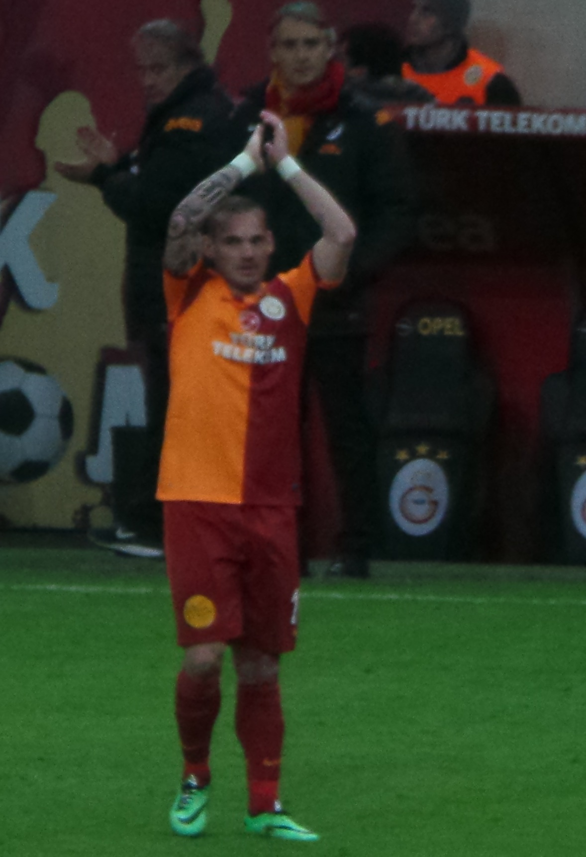 Sneijder hattrick